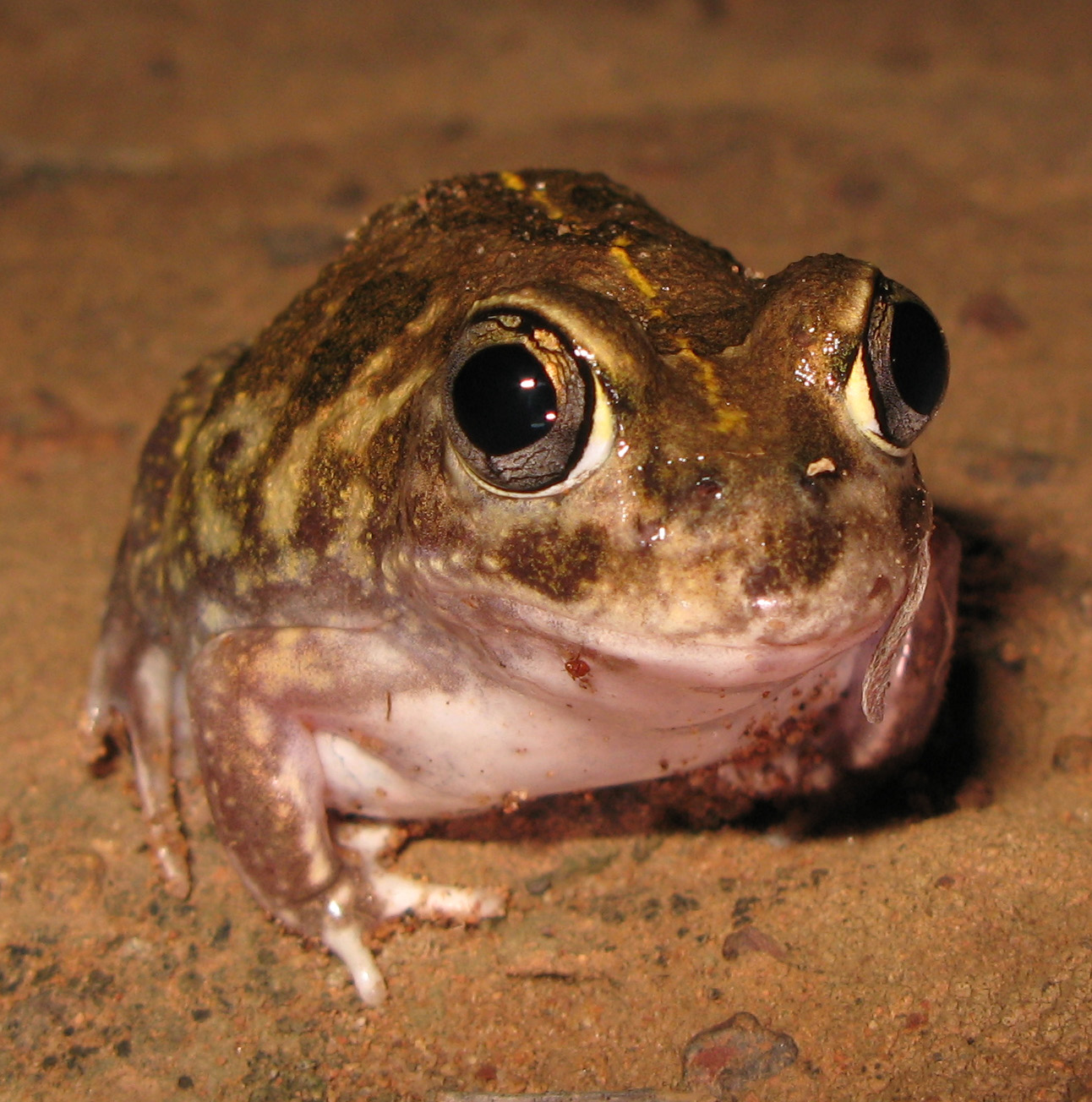 Sudell's Frog (Neobatrachus sudelli) from central NSW, Australia.